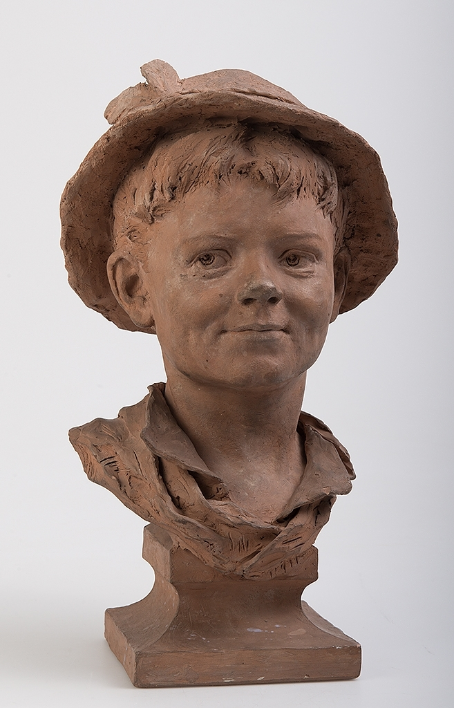 Fiskarpojke (Skulptur) av Ingel Fallstedt i rödaktig lera/terrakotta. Utförd i Paris. Tillhör Bohusläns museum.